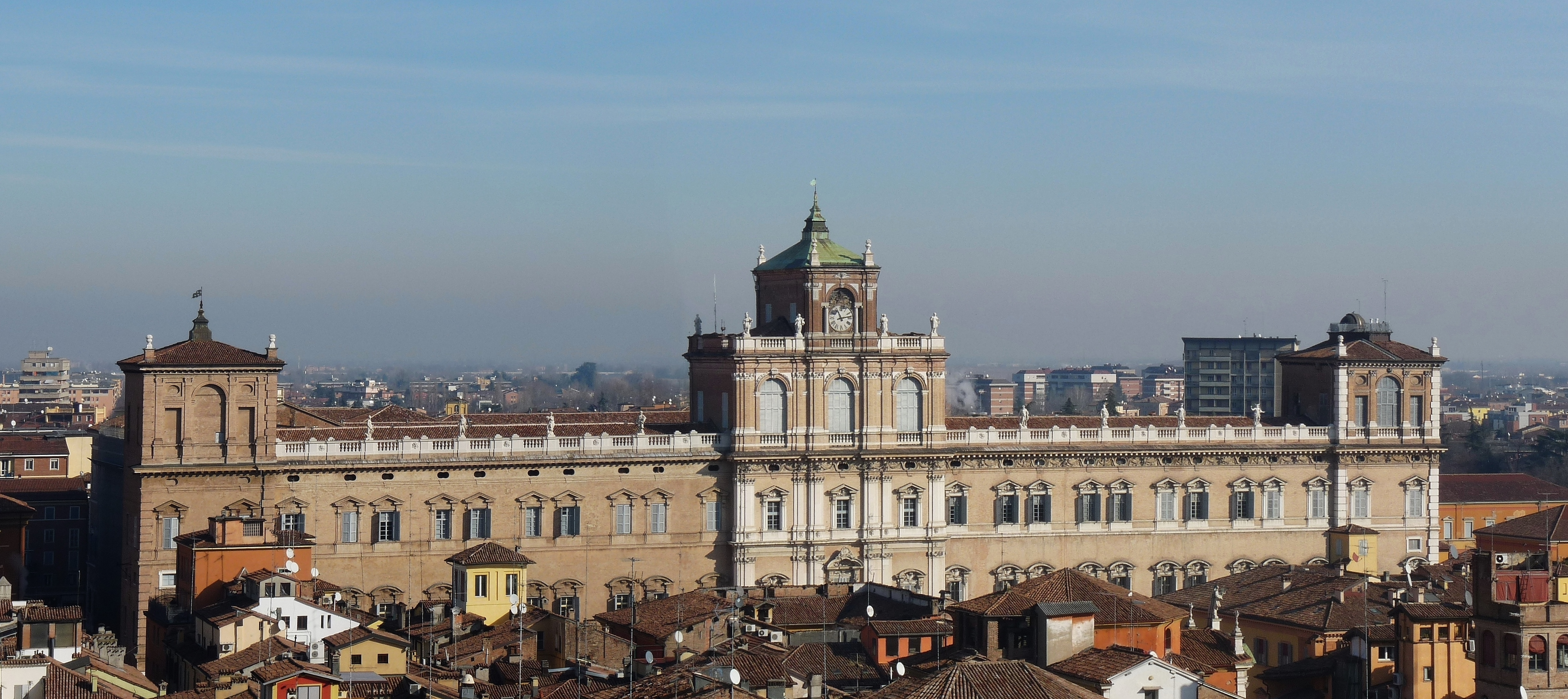 Palazzo Ducale fotografato dalla Ghirlandina This is a photo of a monument which is part of cultural heritage of Italy.